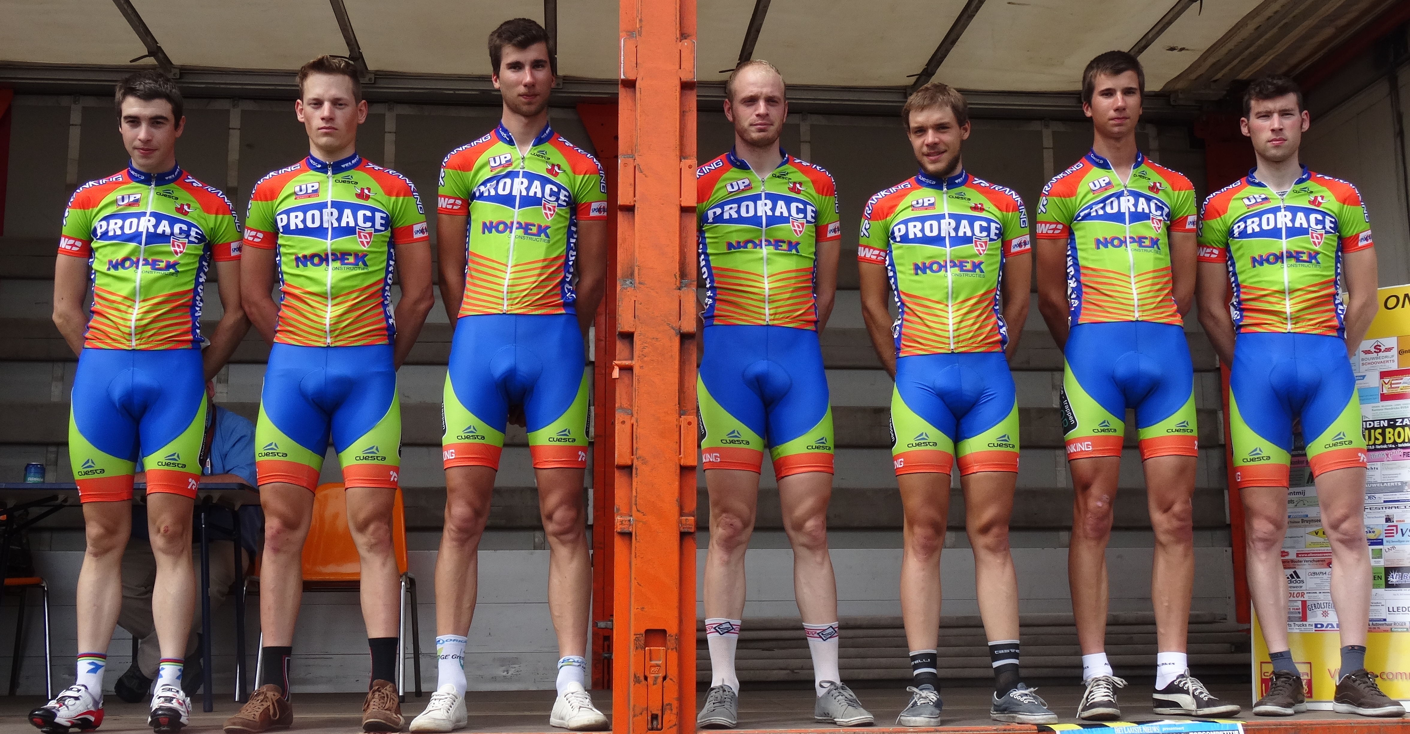 Reportage photographique réalisé le dimanche 8 juin à l'occasion du départ du Mémorial Philippe Van Coningsloo 2014 à Wavre, Belgique.